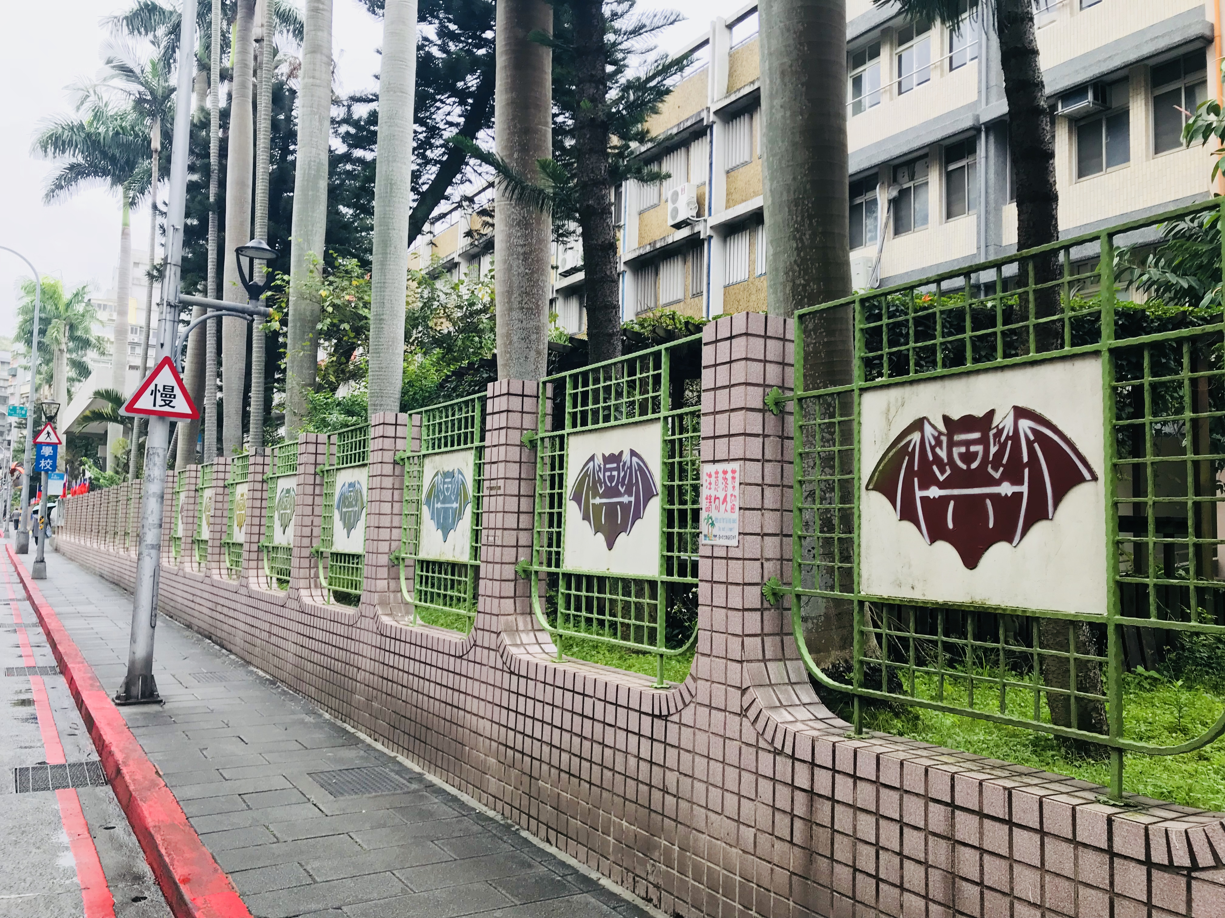 臺北市立興福國民中學圍牆，上有蝙蝠圖樣的校徽